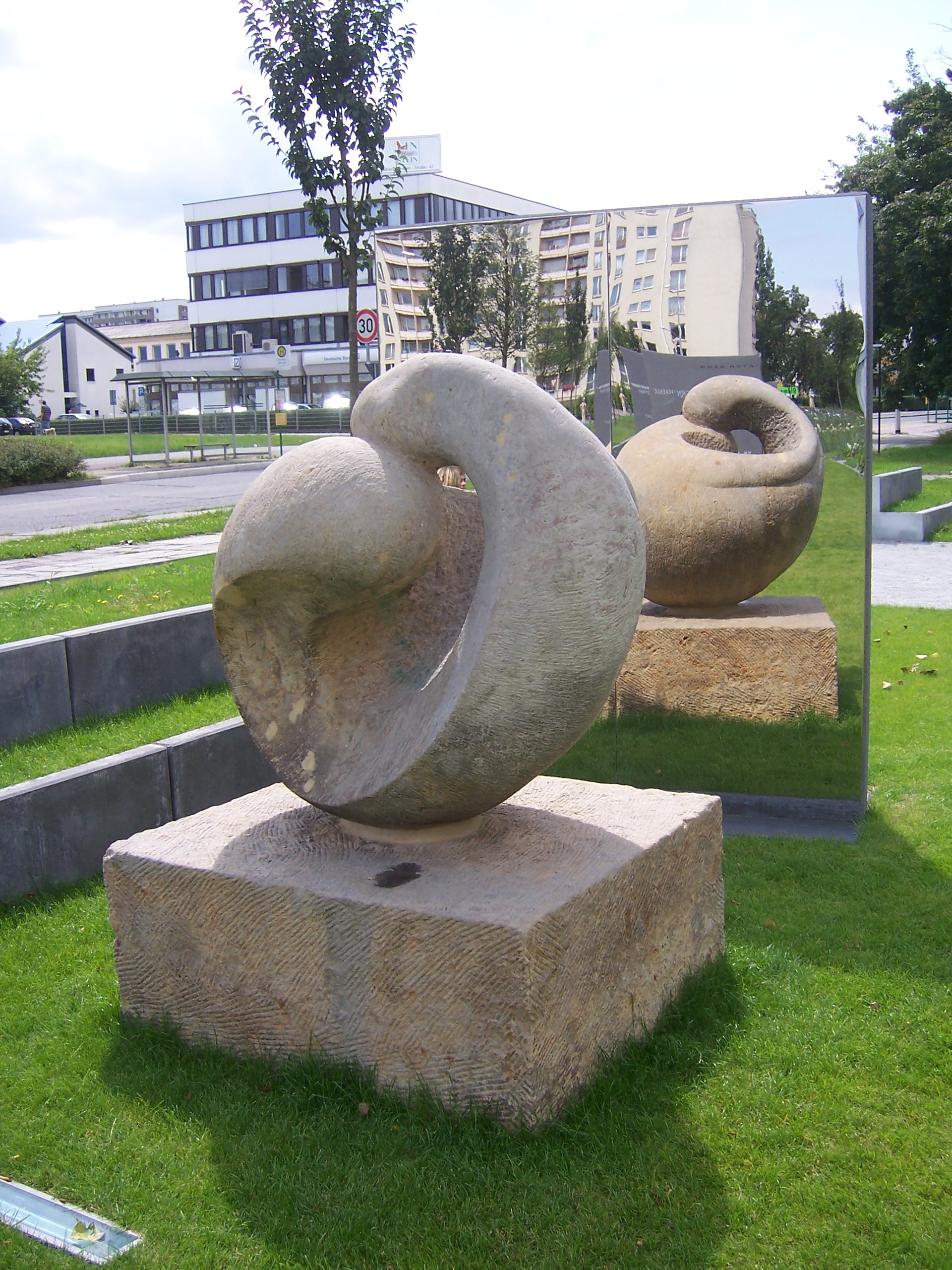 Skulptur Evolution in Hoyerswerda, von Zygfryd Korpalski (Polen)